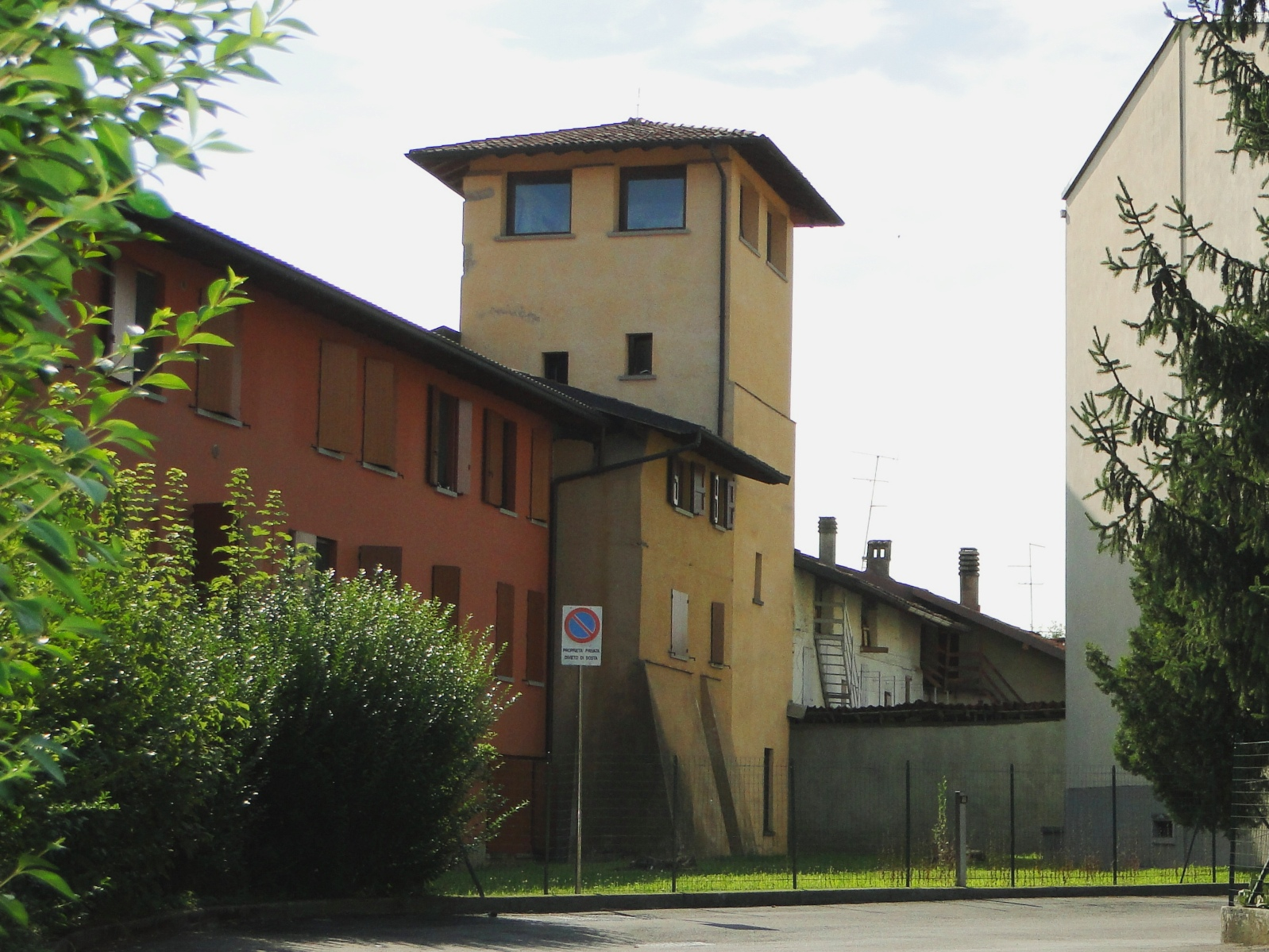 Grumello del Piano (Bergamo), torre